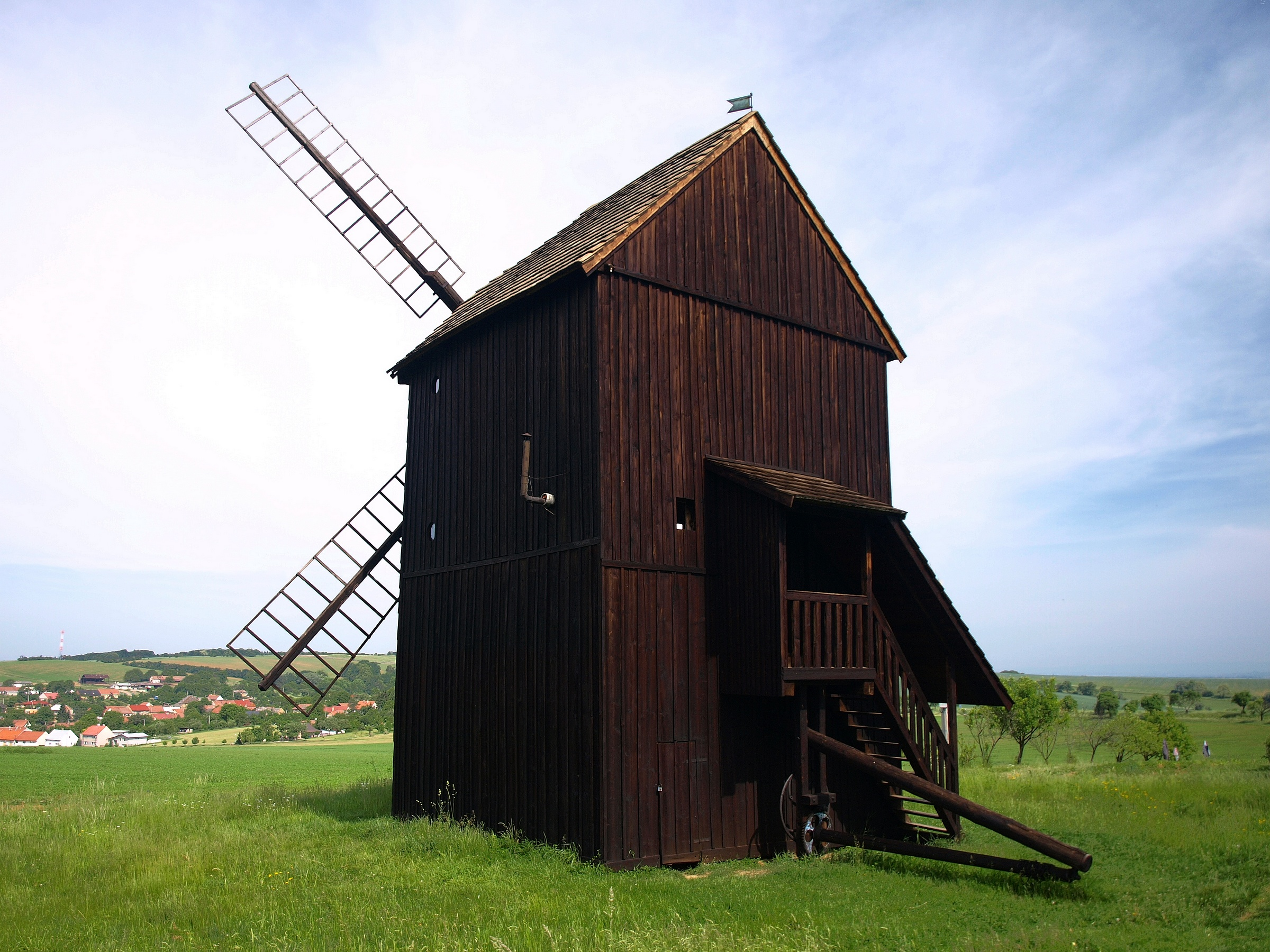 Větrný mlýn (Velké Těšany), Velké Těšany